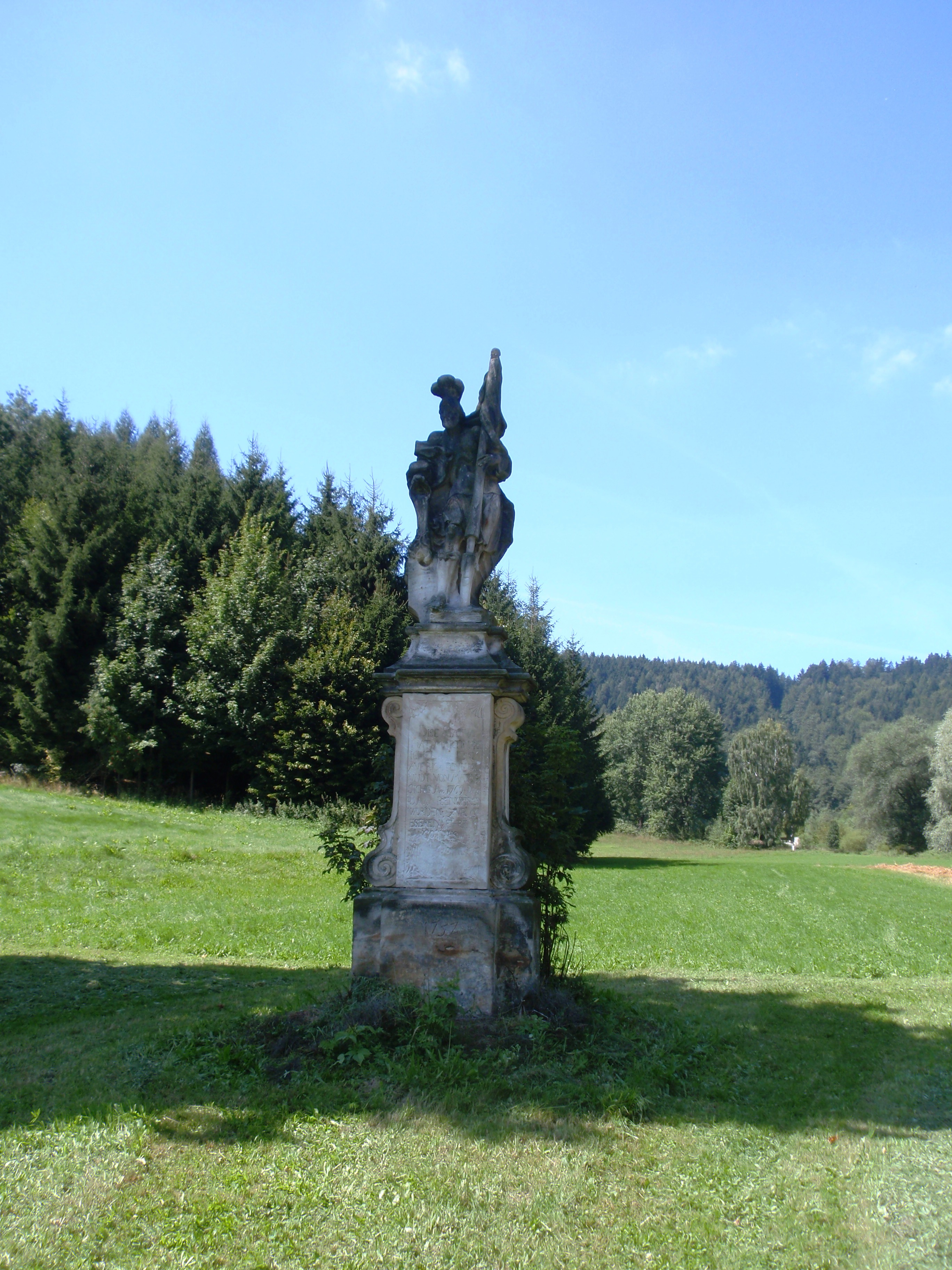 Socha sv. Floriána (Nová Ves), pole, Nová Ves